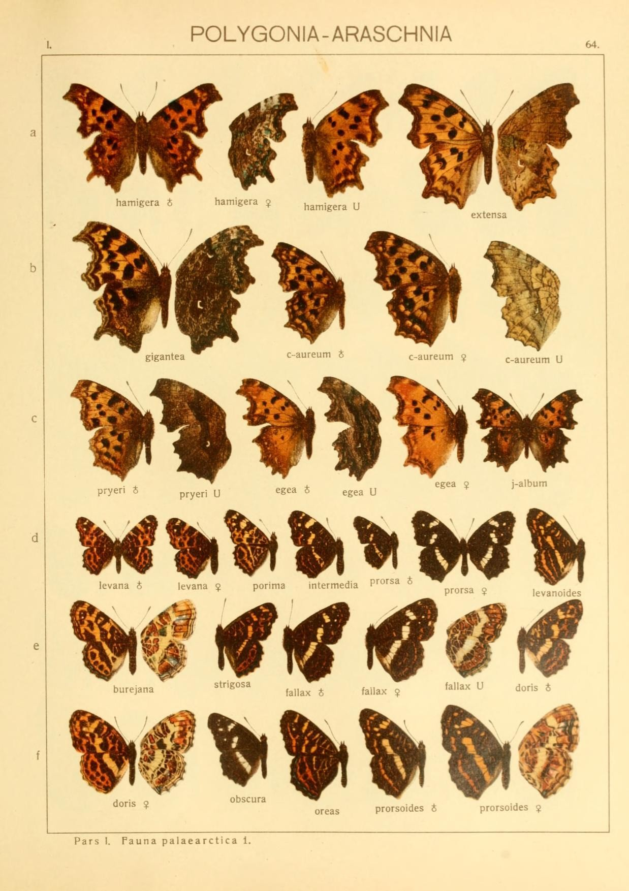 POLYGONIA-ARASCHNIA gigantea c-aureum i c-aureum ? c-aureum U )^W '^'y^ * prvcri U ^K^a * cKea U egea 9 j-album Icvana ;*; levana 2 porima intermedia P"""^^^ ■ ^ ^^ ' irtfi^«?i# blUx i fai I'l-'^ l-' dons 5 obscura ^W^ ^^ ^^r oreas prorsoides i prorsoides :^ Pars I. Fauna palaearctica 1.